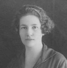 Anna Marie Úlehlová